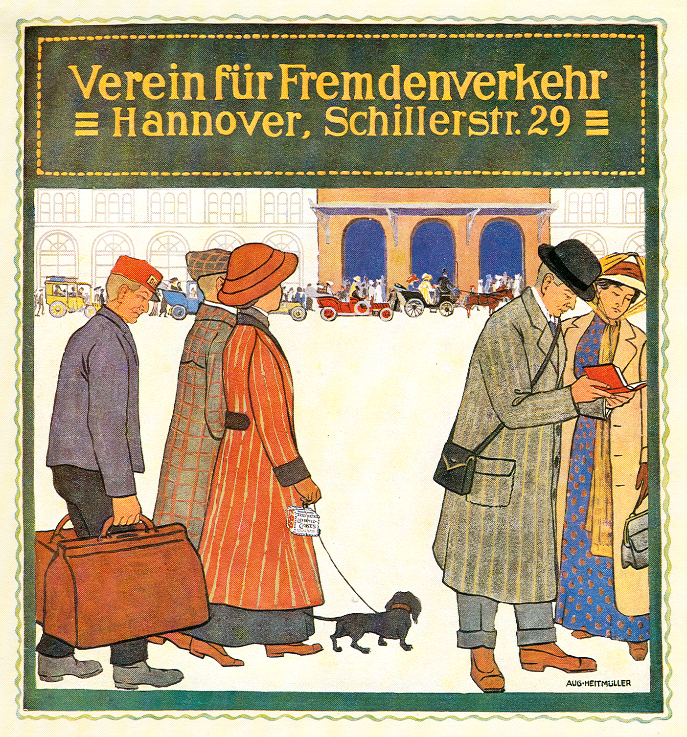 Anzeige des "Vereins für Fremdenverkehr" mit Sitz in Hannover, Schillerstraße 29, gezeichnet von August Heitmüller und gesponsert von Bahlsen, erkennbar durch die abgebildete Leibniz-Cakes-Packung in der Hand der Dame mit dem Dackel. Die Szene zeigt wohlhabende Reisende auf dem Ernst-August-Platz vor dem Hauptbahnhof von Hannover ...